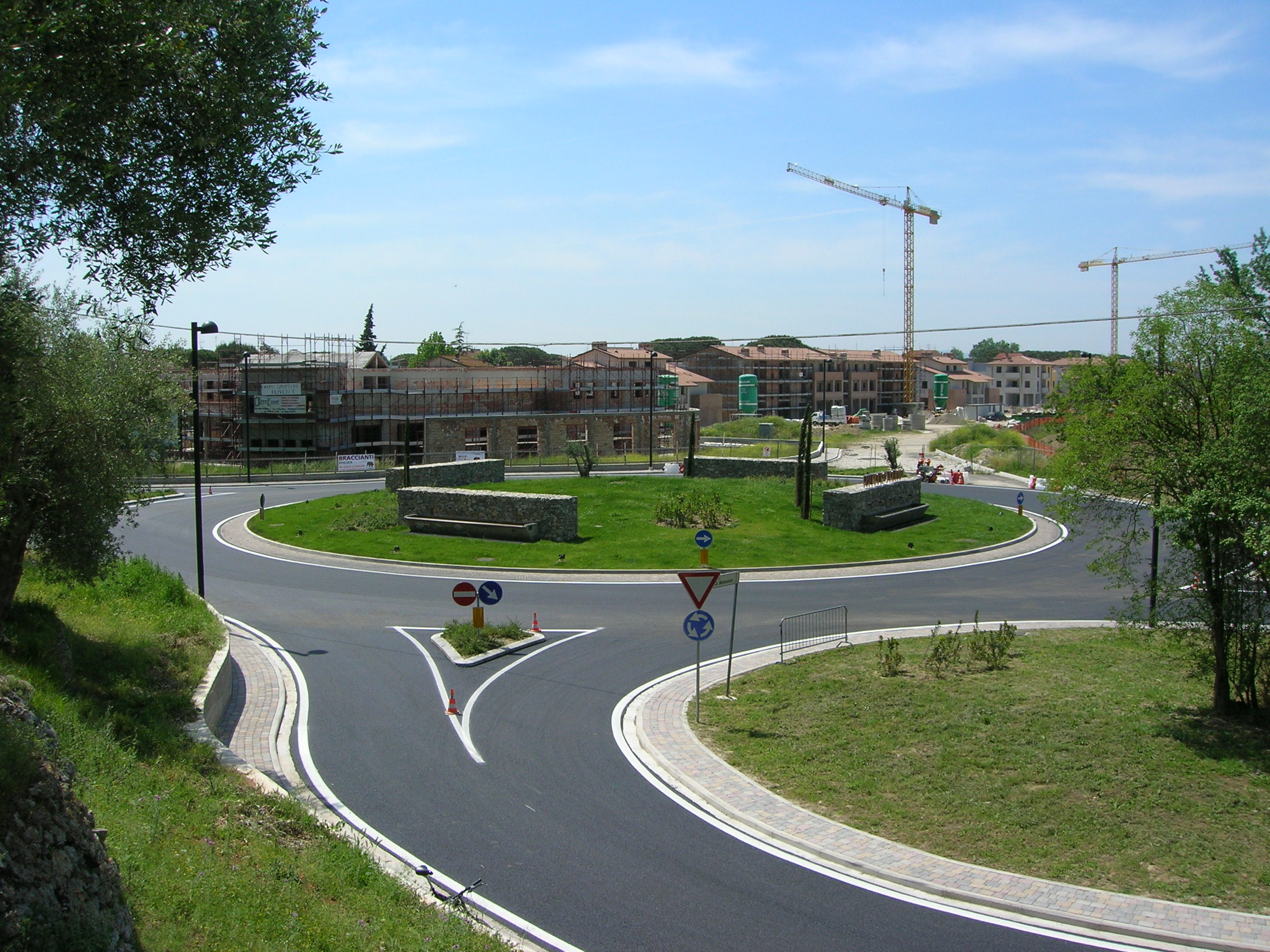 La rotonda della Porta di Uliveto